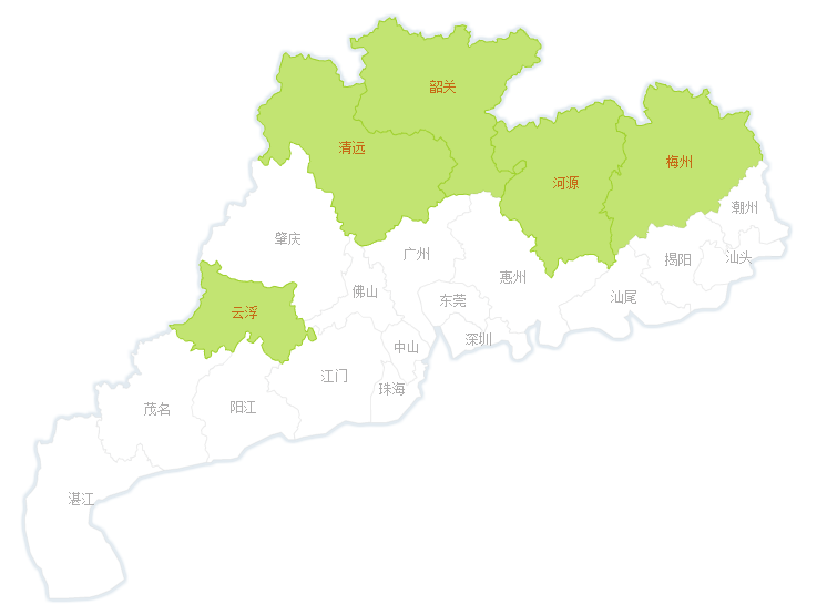 中文（中国大陆）: 粤北地理位置